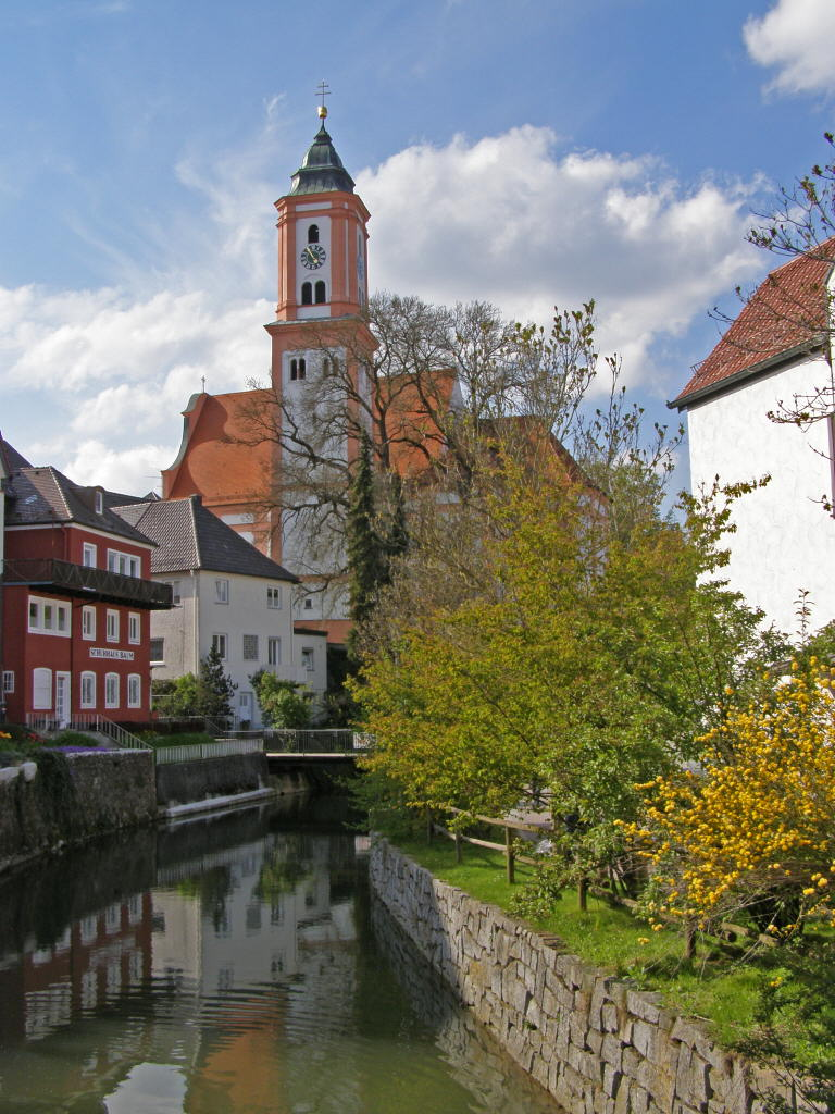 Krumbach (Schwaben) - Kath. Pfarrkirche St. Michael